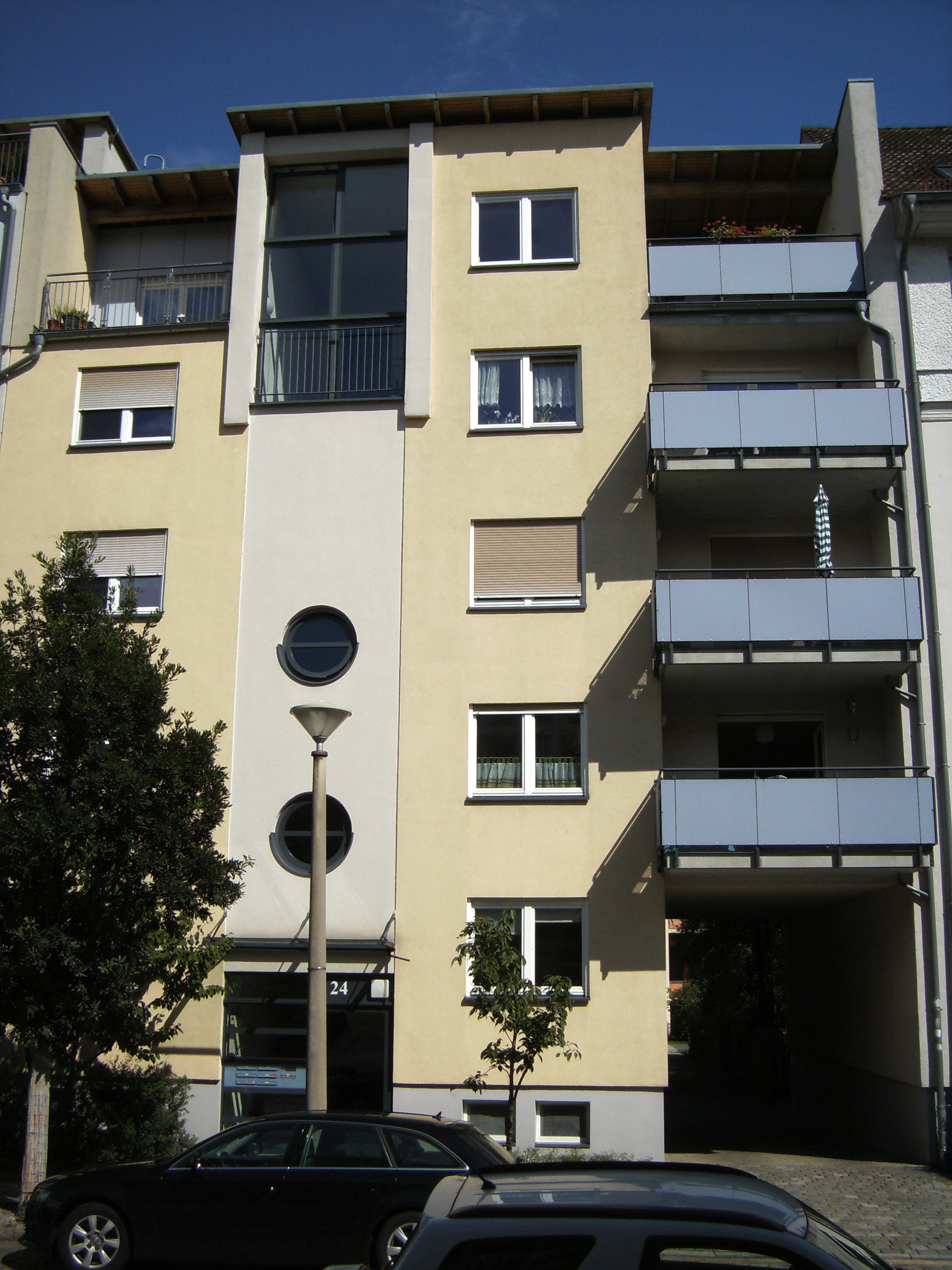 Wernerstr. 24